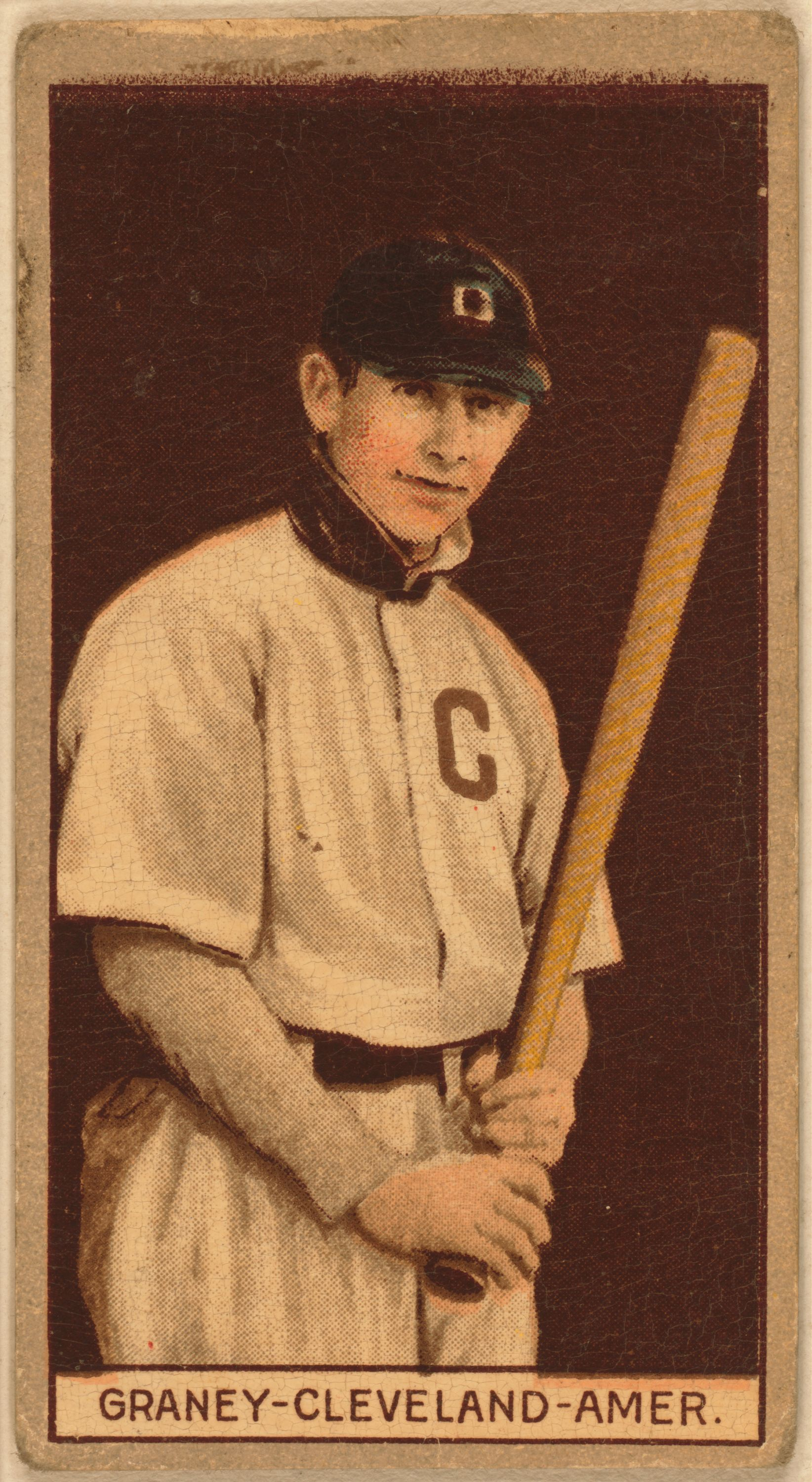 J. G. Graney